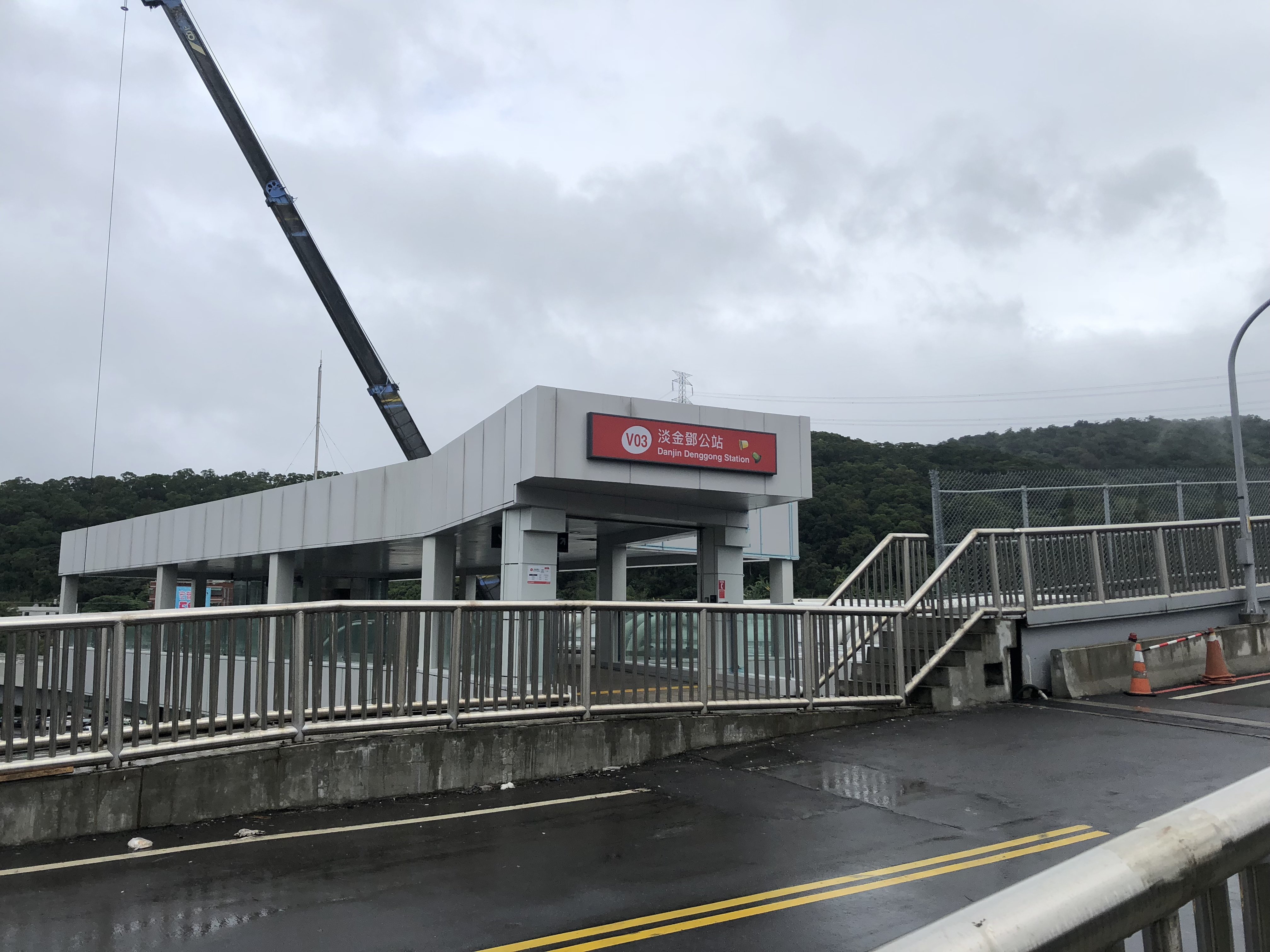 淡金鄧公站